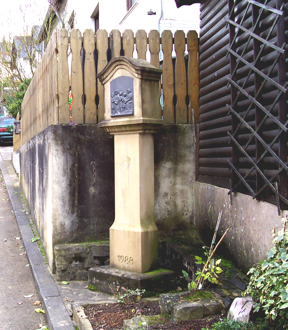 Wasserliesch, Kreuzwegstation